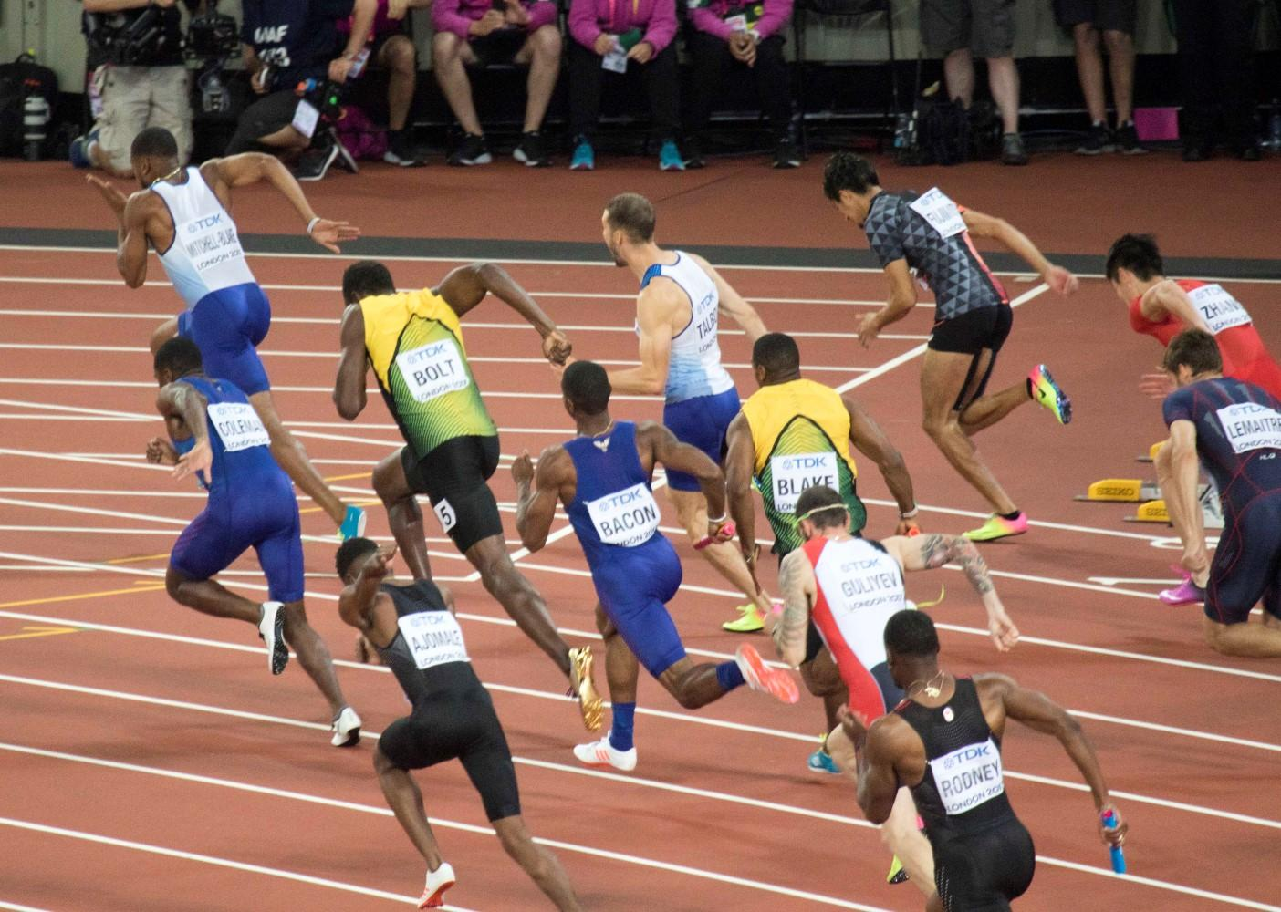 d8_76060 4x100m heren